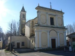 Casalromano (Mantova): chiesa di San Bartolomeo Apostolo nella frazione Fontanella Grazioli==